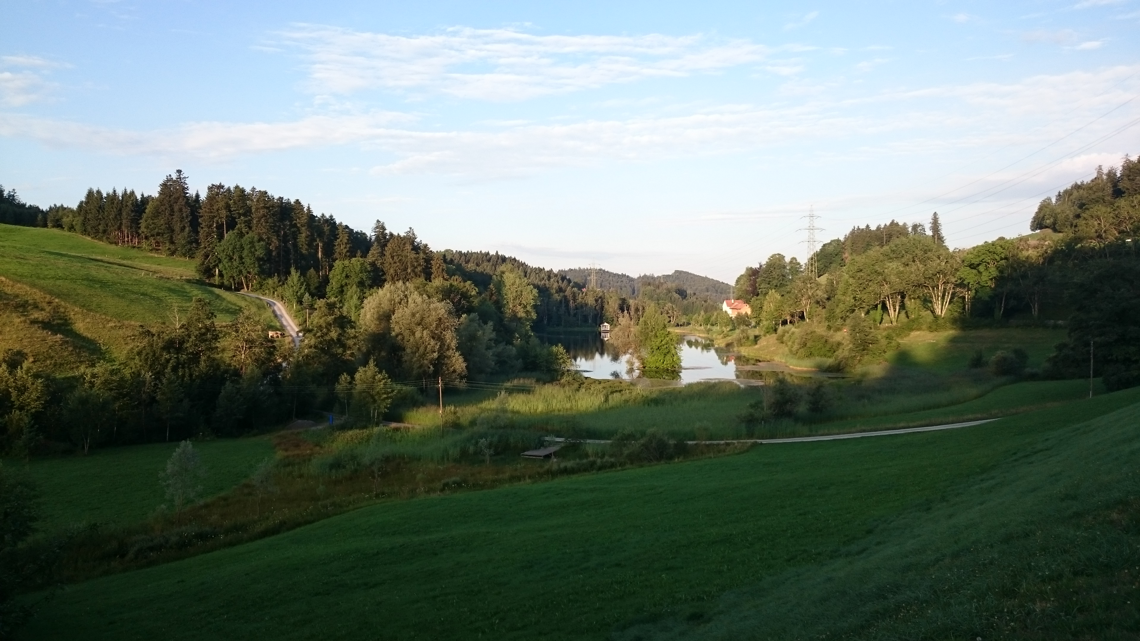 Blick auf den Wenigerweier in Richtung Westen (St. Georgen).